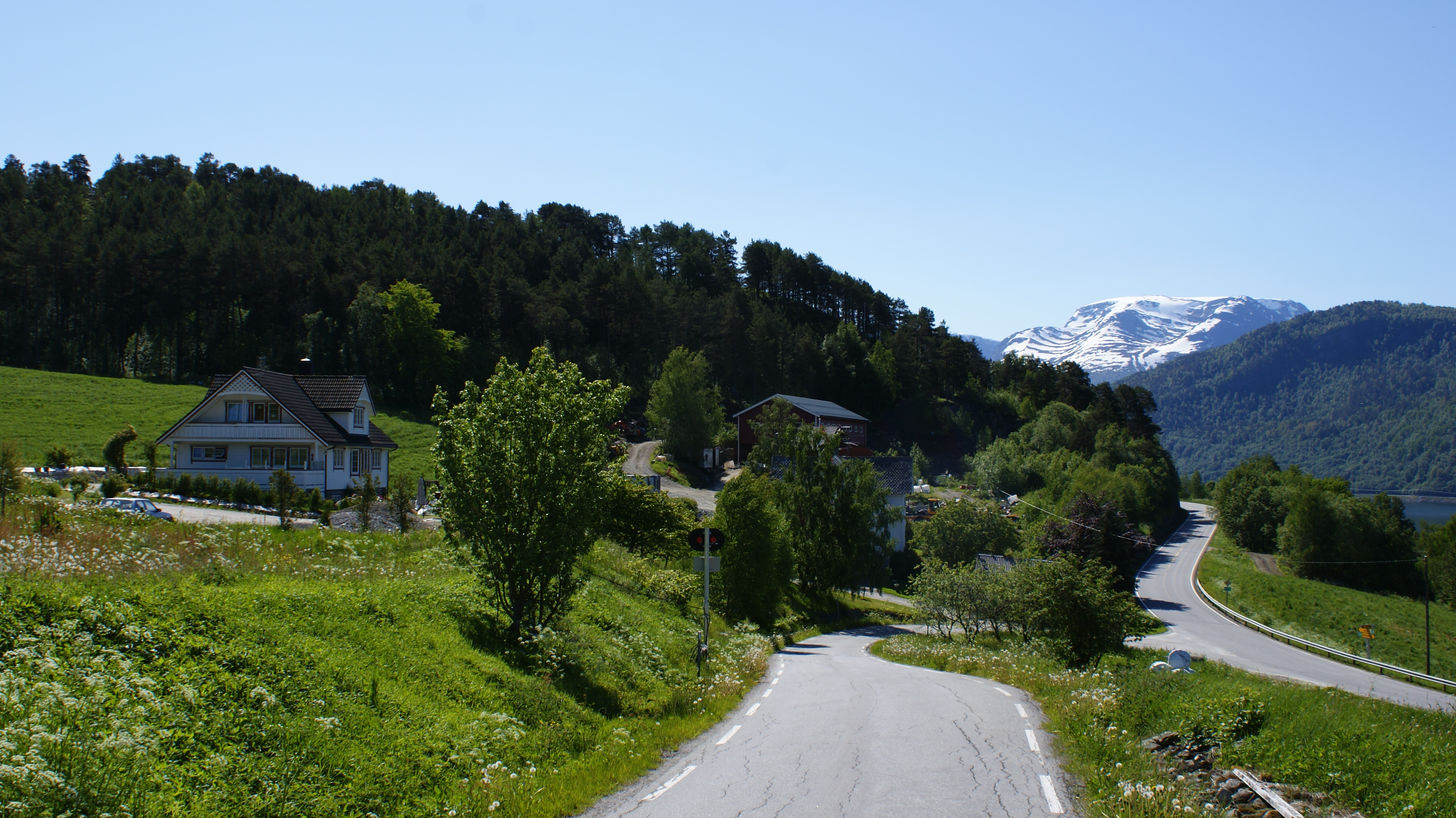 E39 bend at Anda, near Sandane Airport, Sogn og Fjordane, Norway.